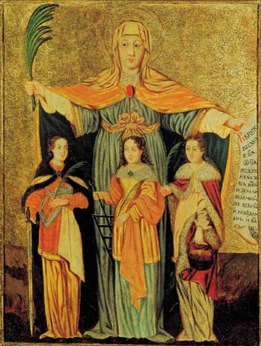 Святыя мучаніцы Соф’я, Вера, Надзея і Любоў. XVІII ст. Валынь